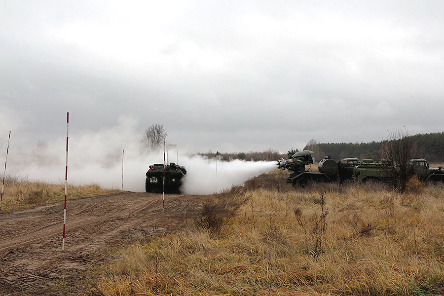 Тактические занятия военнослужащих 27-й отдельной бригады радиационной, химической и биологической защиты (27-я обррхбз, в/ч 11262) Западного военного округа